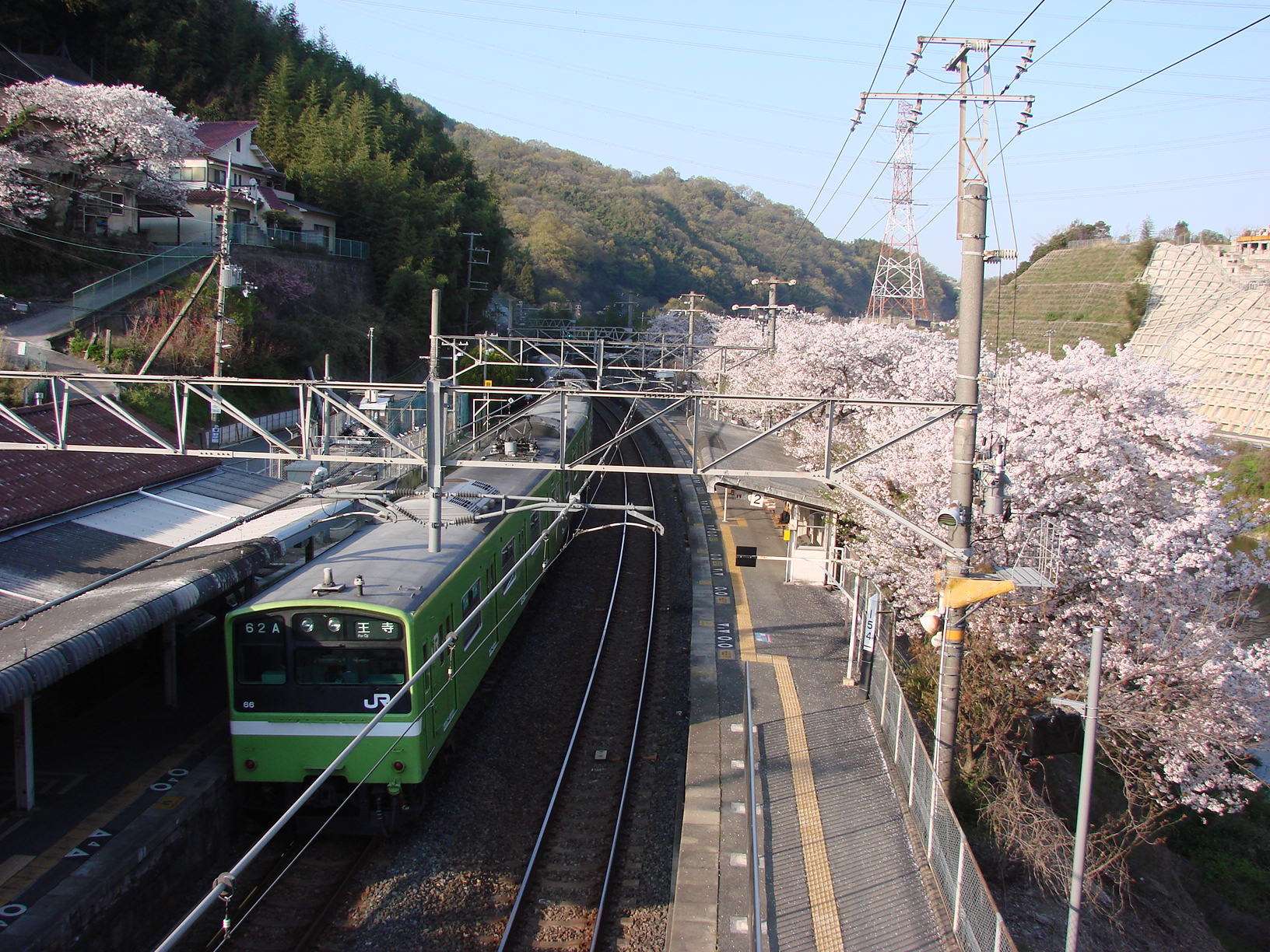 JR西日本 河内堅上駅